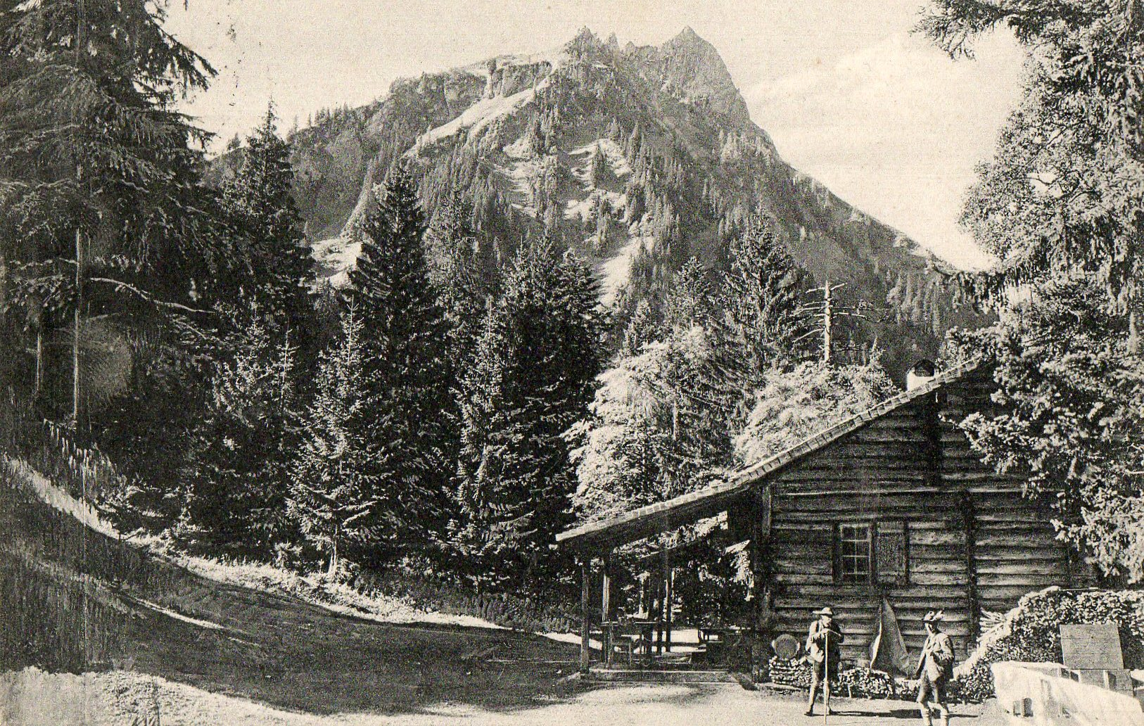 Jagdhaus des Prinzregenten Luitpold am Schrattenberg bei Hinterstein